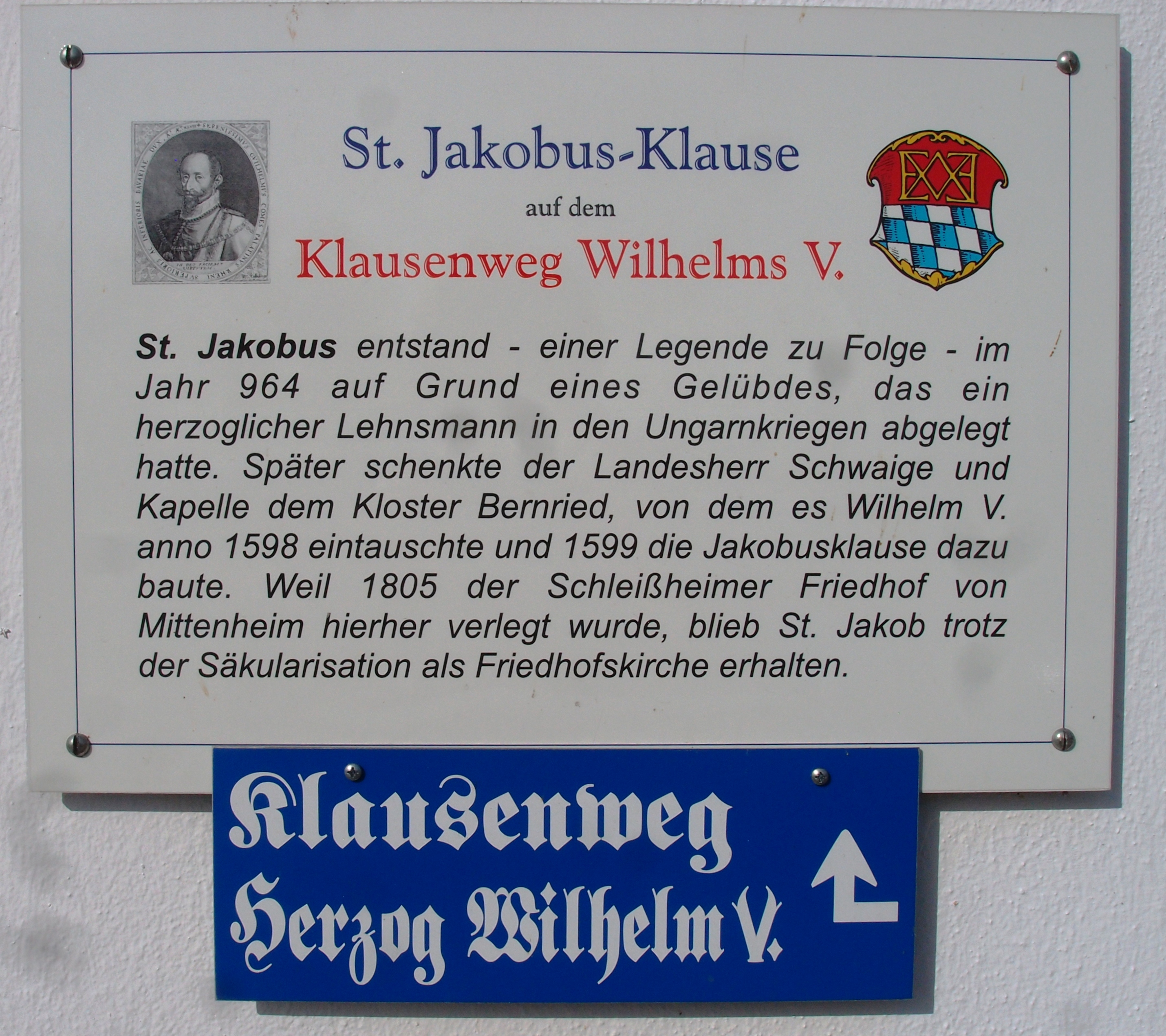 Schild an der Jakobuskapelle in Hochmutting